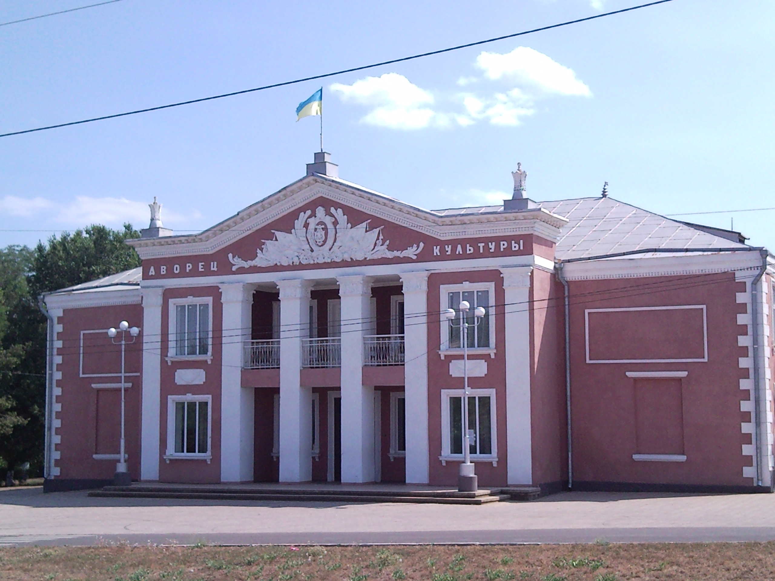 Кулевча Будинок культури